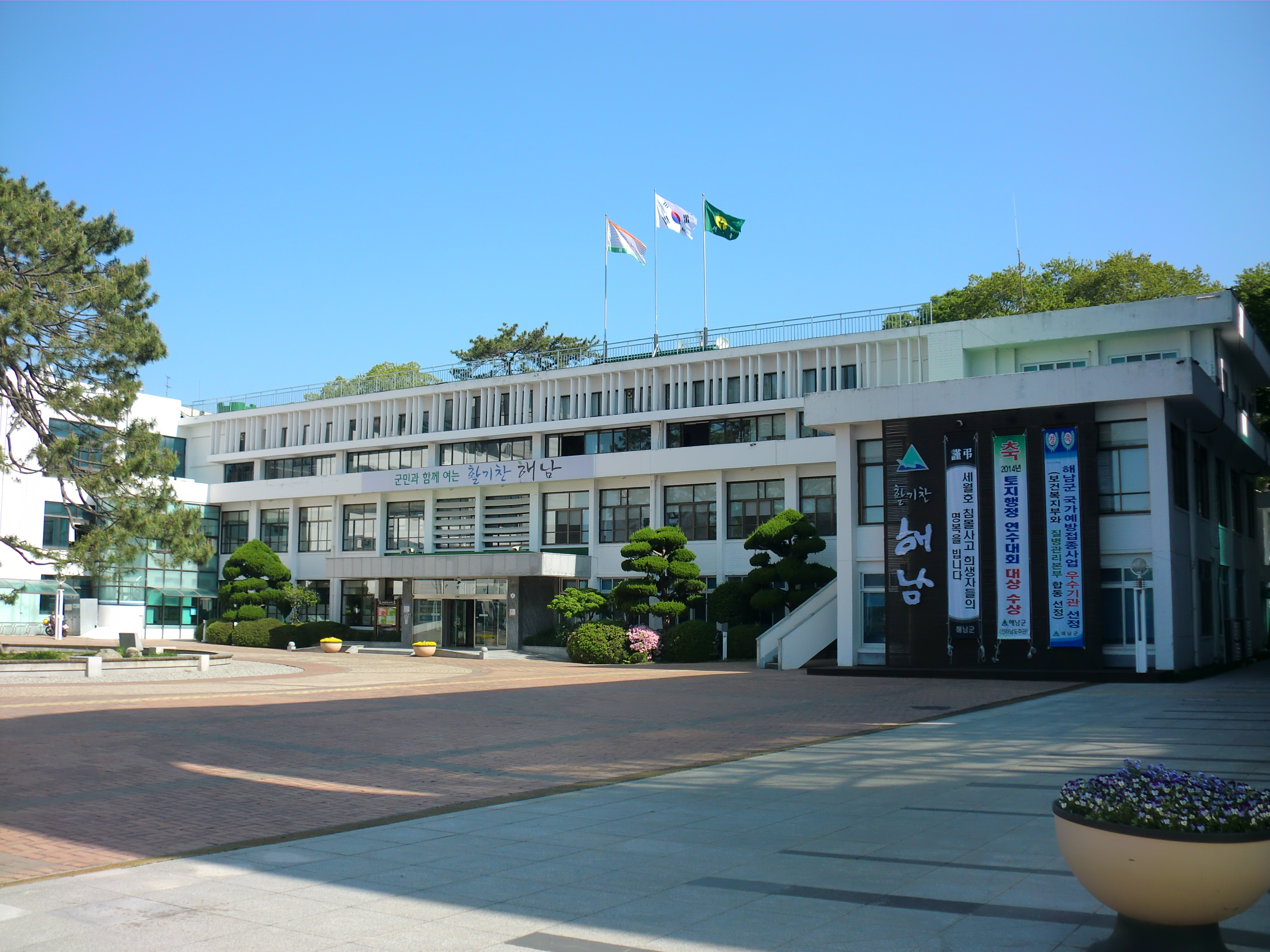 전라남도 해남군에 있는 해남군청